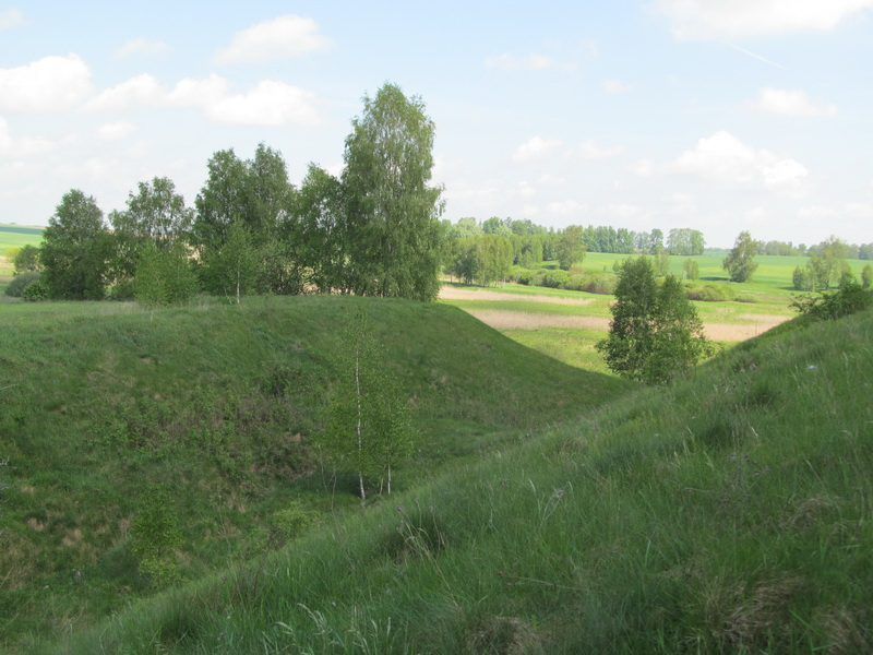 Старая Мыш. Валы замка Хадкевіча